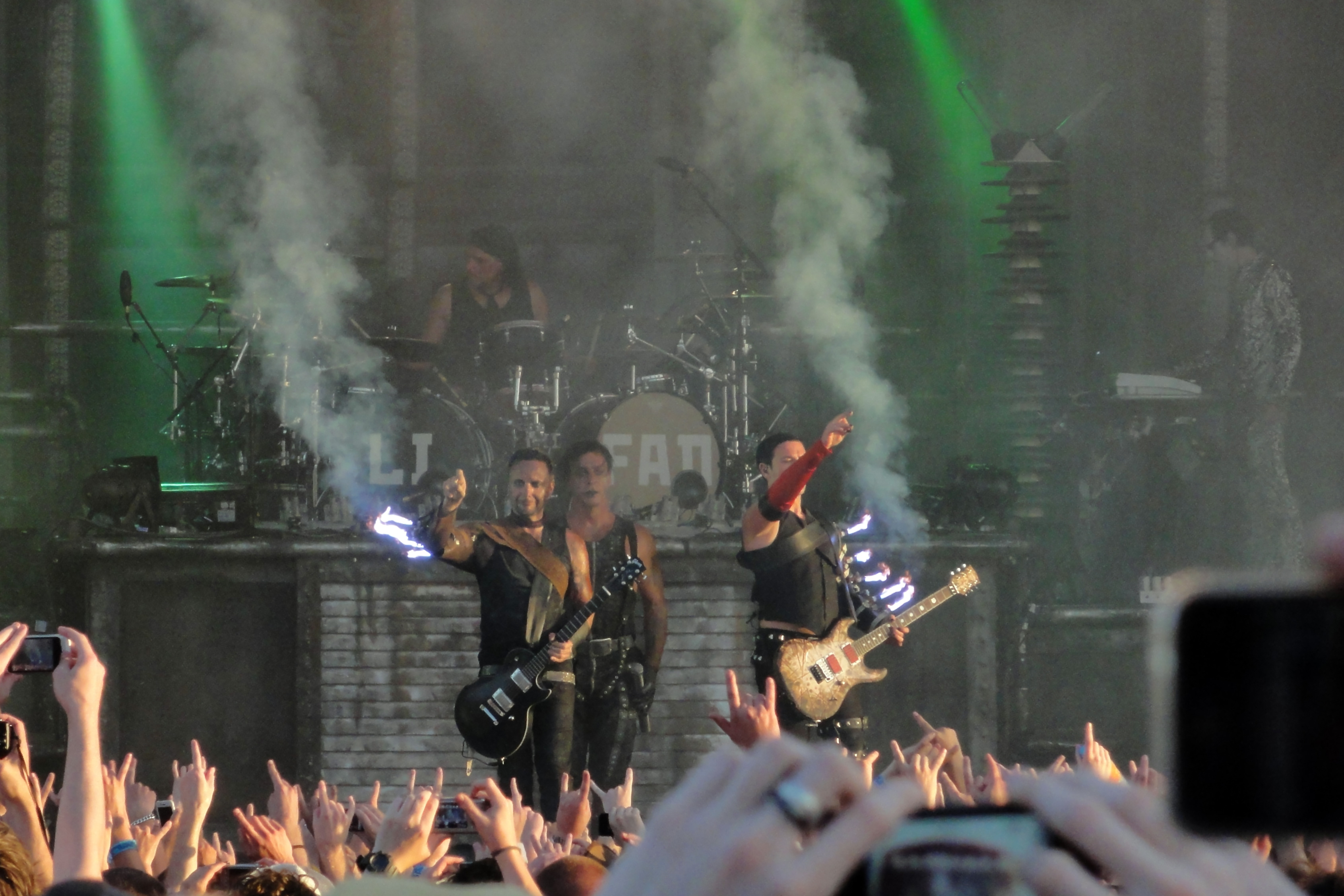 Rammstein